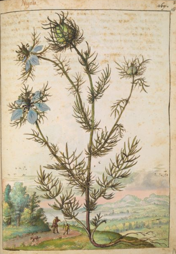 Gherardo Cibo, Herbal, BL MS. Add. 22332 f 161r Nigella damascena